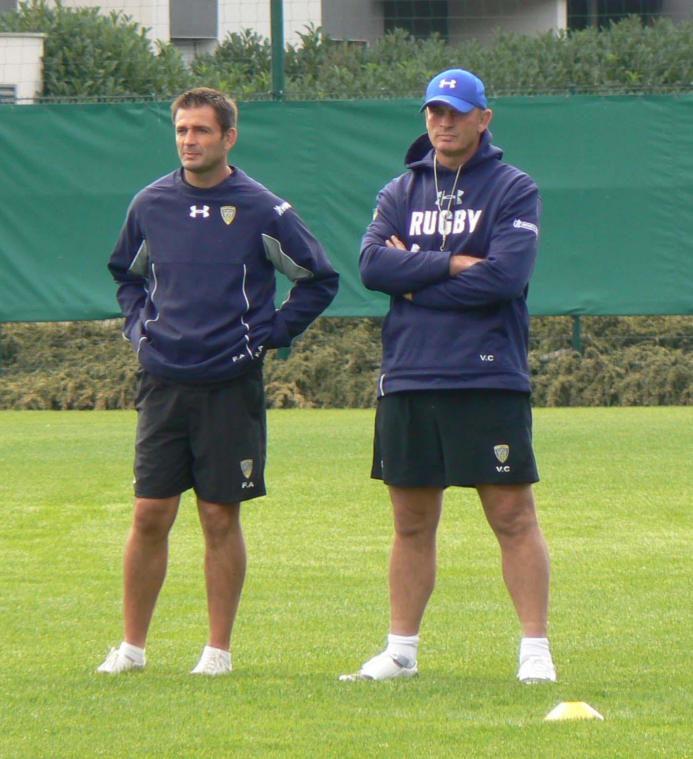 Les entraîneur de l'ASM Clermont Auvergne Franck Azéma (à gauche) et Vern Cotter (à droite)